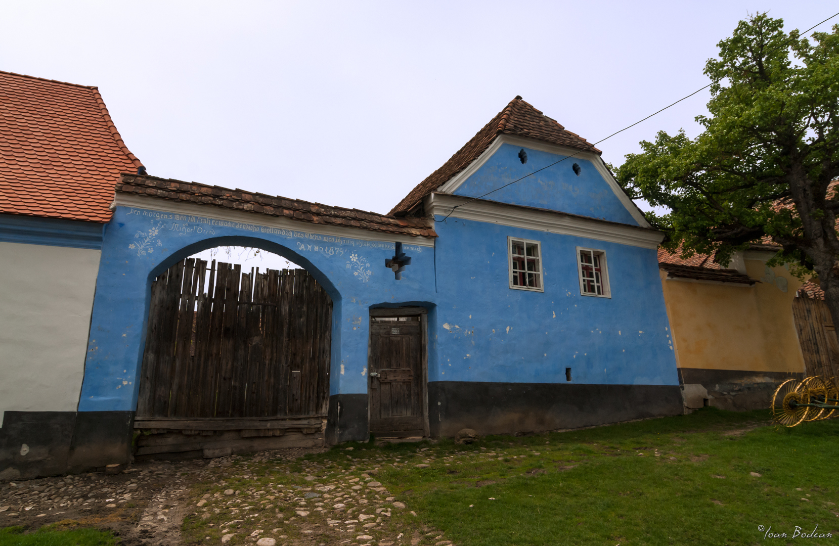 Casă Viscri